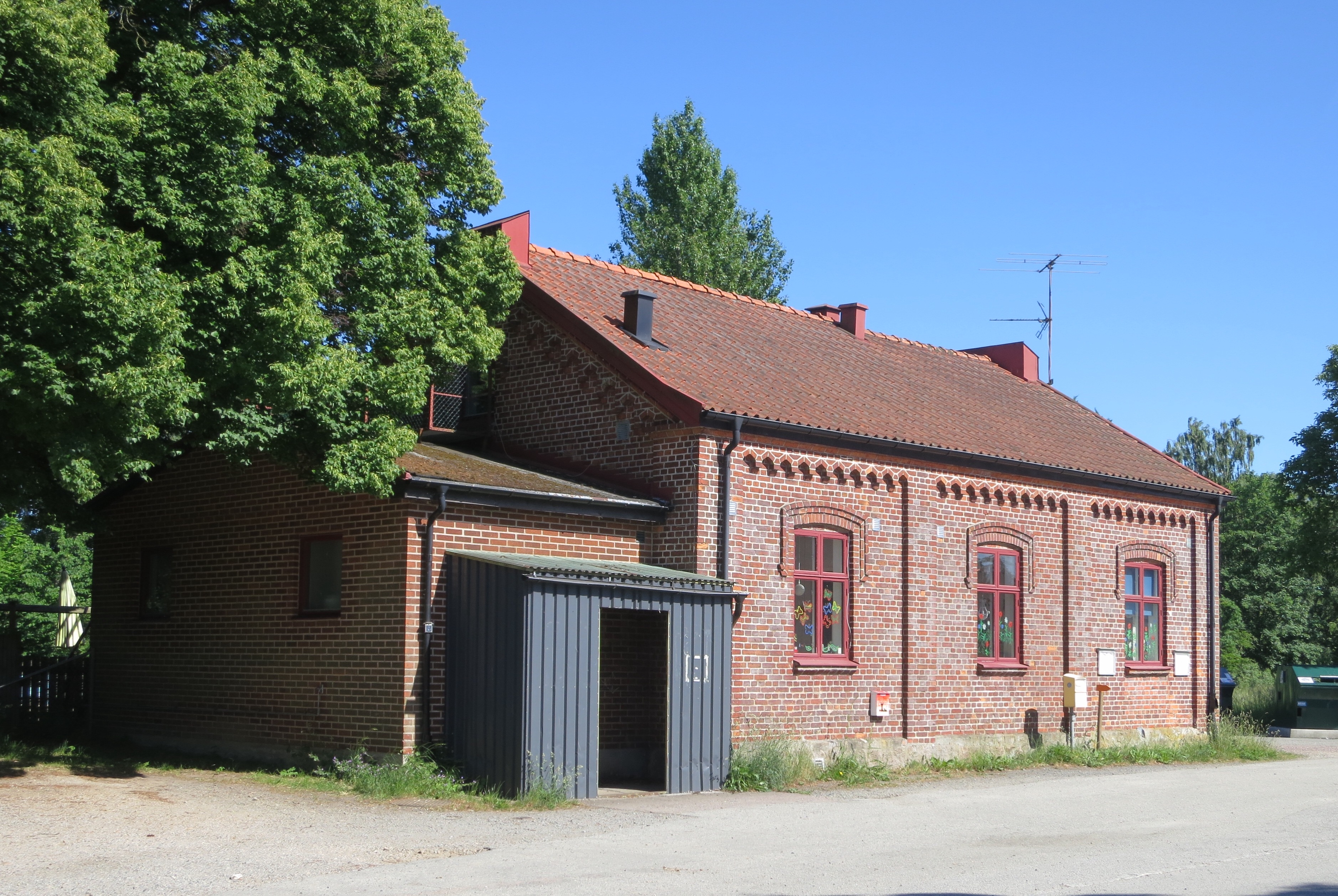 Holmeja station, Skåne